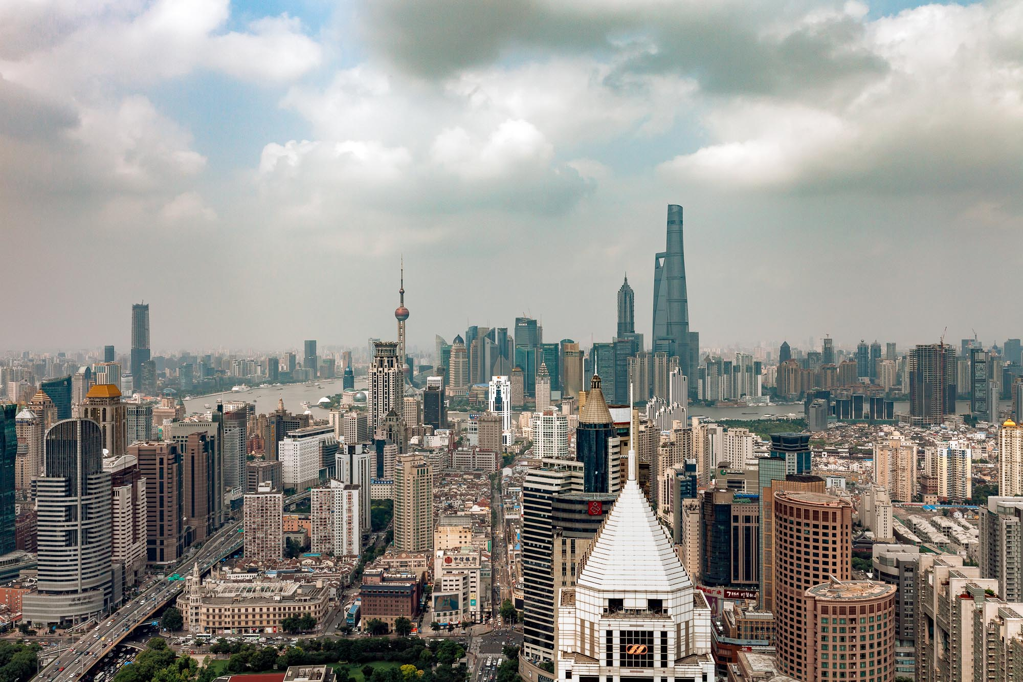 Shanghai skyline view from June 2015, shot from the top of the K11 building